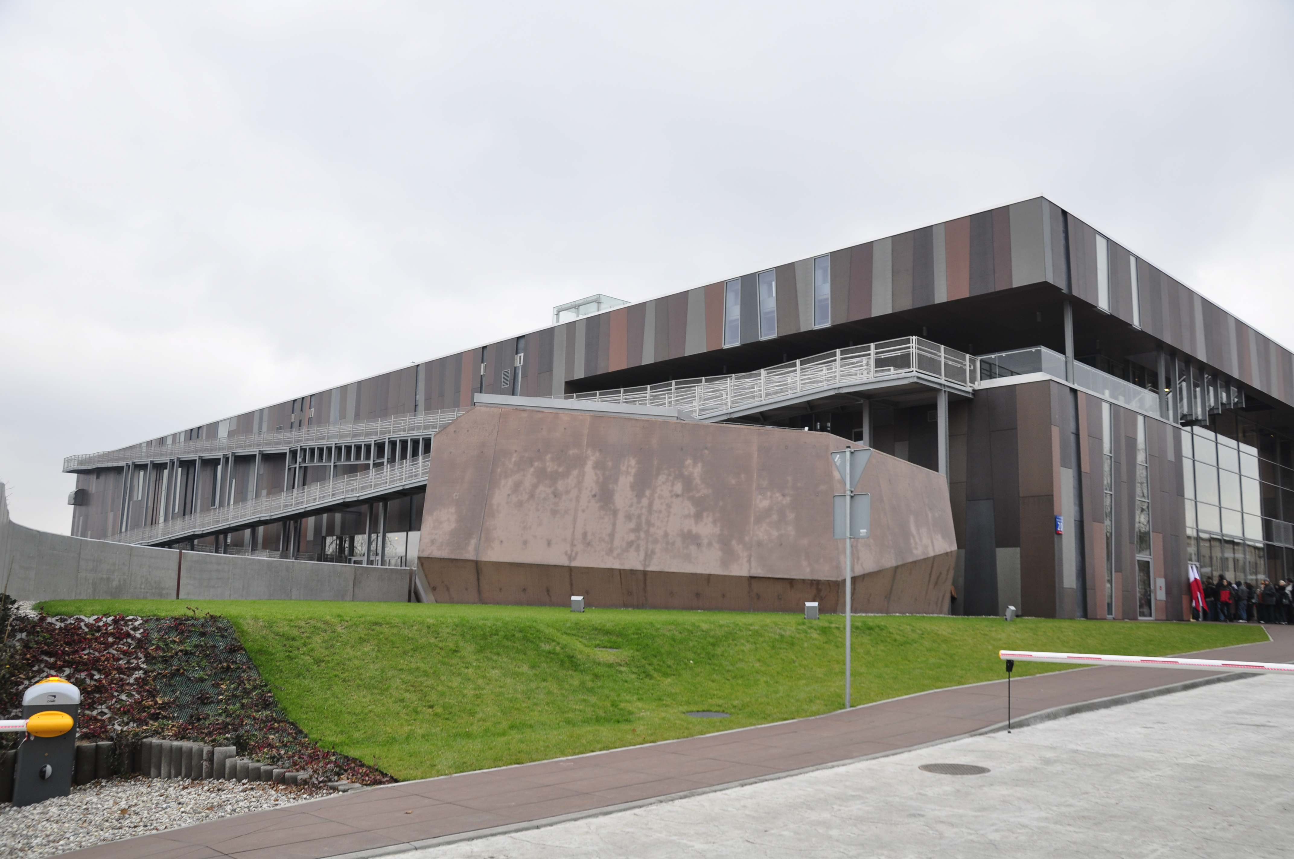 Kopernikus Zentrum Warschau